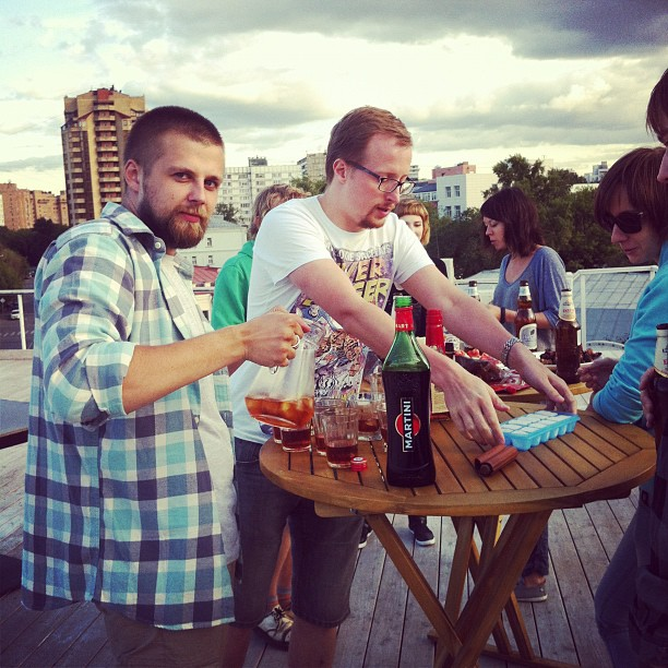 Основатели сервиса "Сёрфингбёрд", Дмитирий Шалашов и Сергей Шалаев, июль 2012 года.